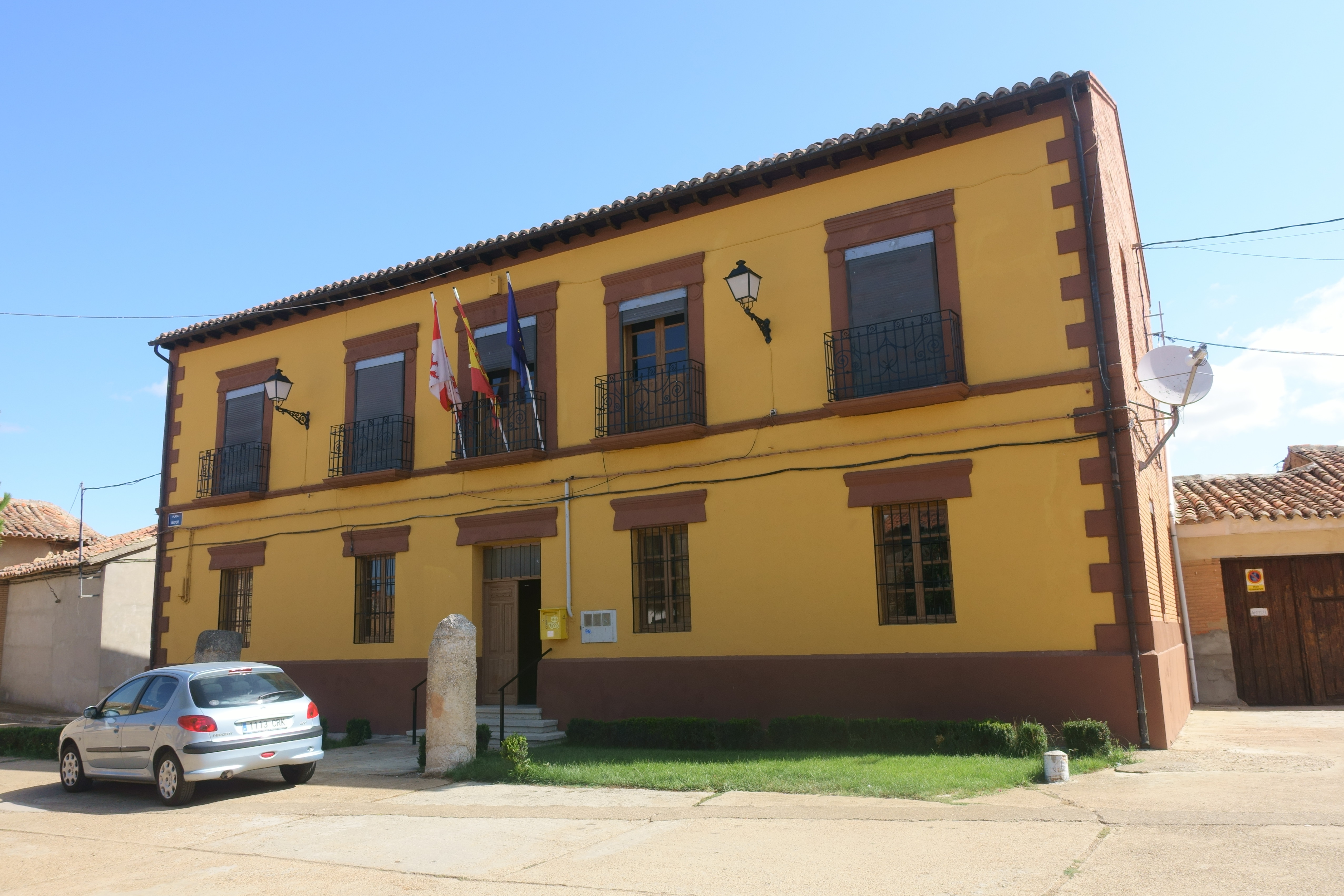 Casa consistorial La Unión de Campos (Valladolid, España).